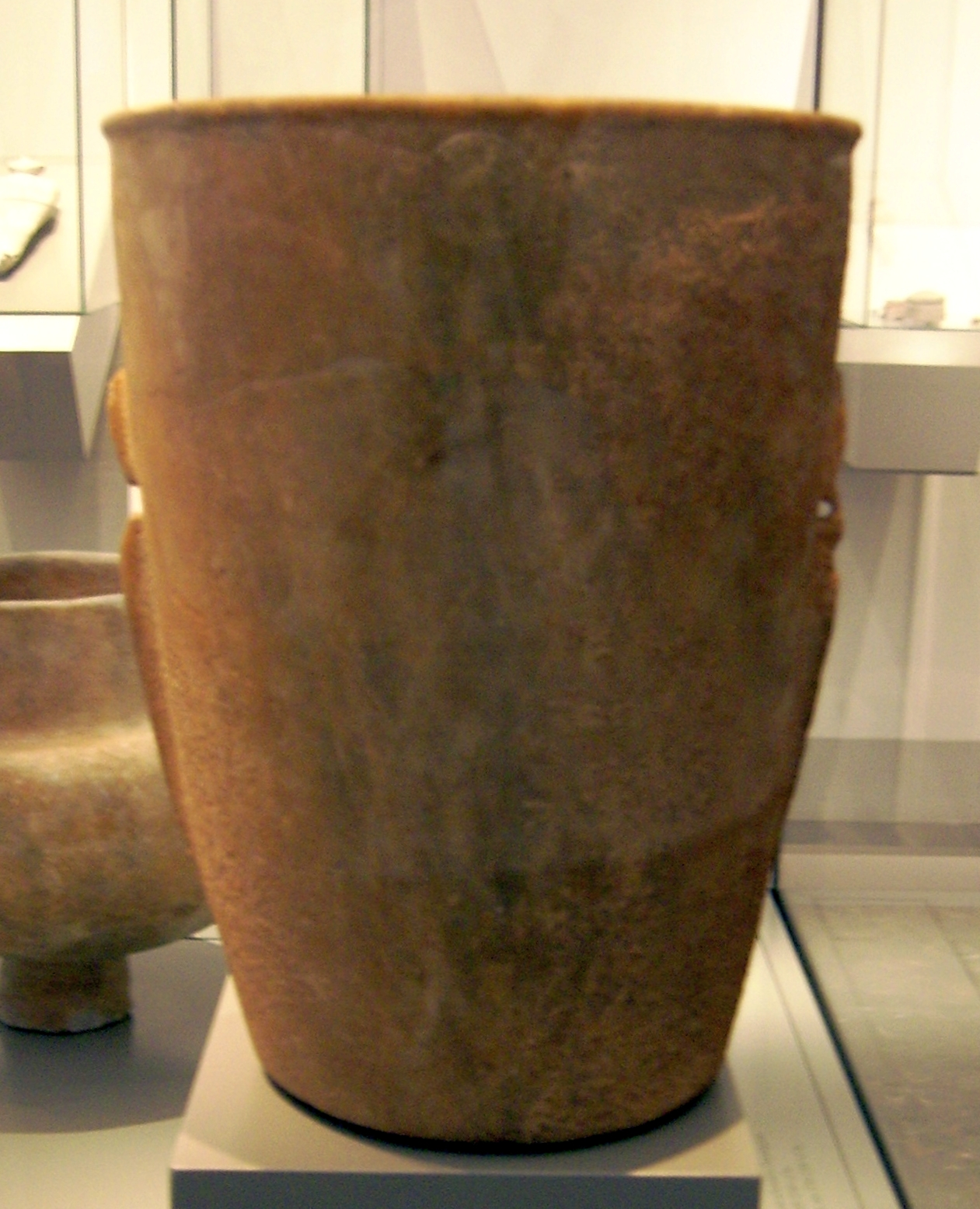 Kykladisches Gefäß aus Marmor mit Ösenrippen, um 3000/2700 v. Chr., Altes Museum: Antikensammlung Berlin